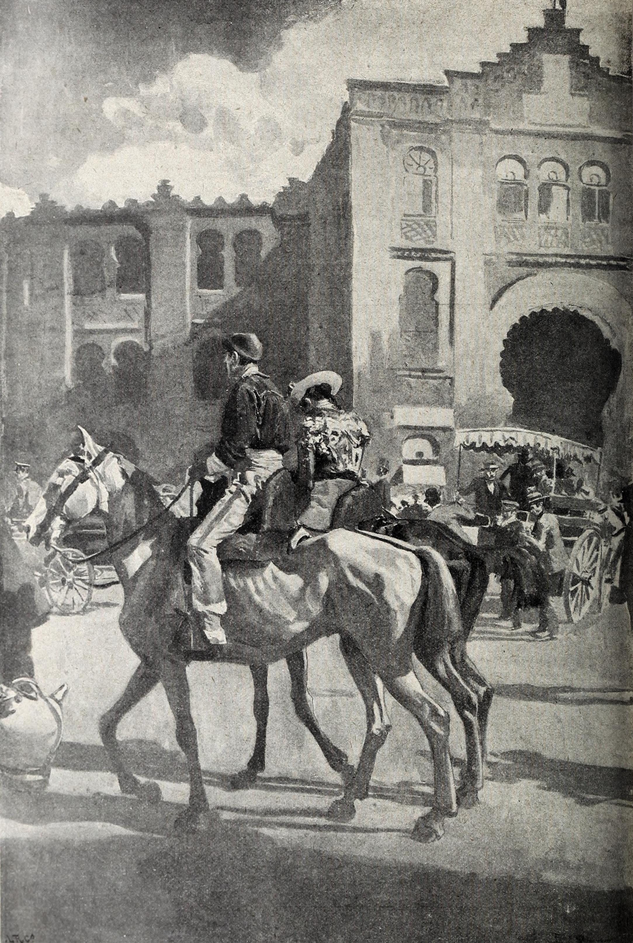 La fiesta nacional. Pensando en el hule.